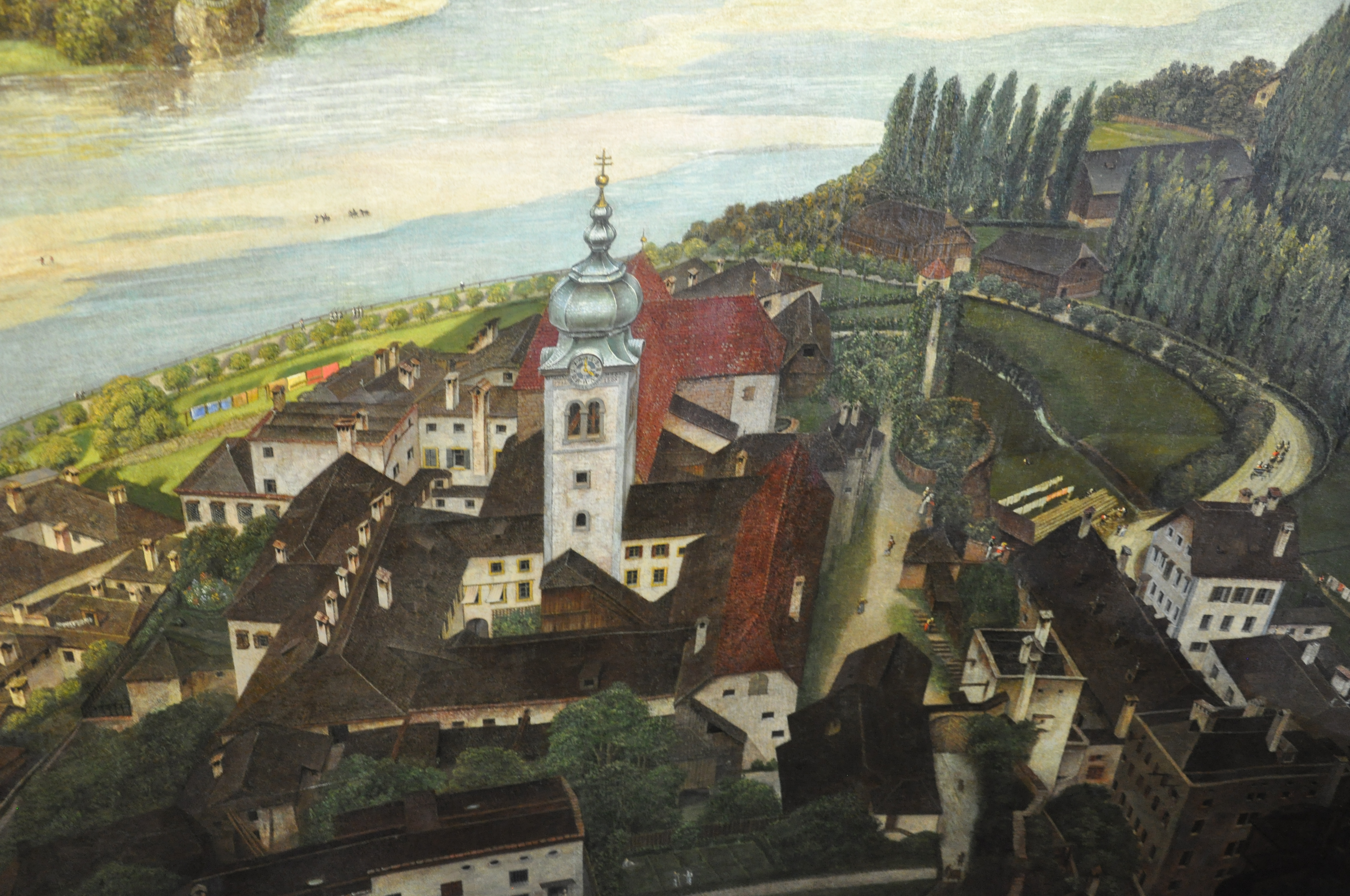 Panorama der Stadt Salzburg von Johann Michael Sattler, 1825–1829. Panoramamuseum des Salzburg Museums. Detail: Stift Nonnberg